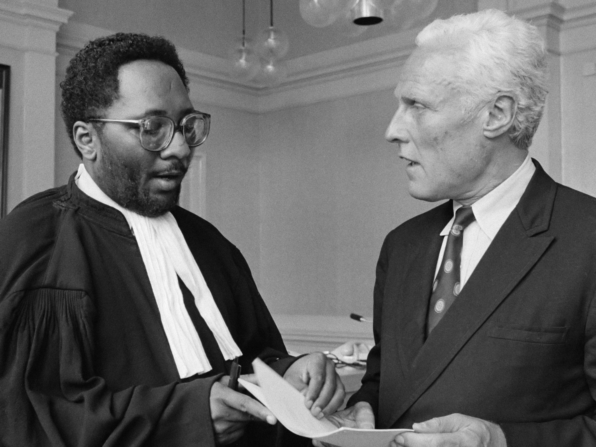 Kort geding van journalist Willem Oltmans tegen NRC/Handelsblad over een artikel; Willem Oltmans (r) met zijn advocaat Andre Haakmat 4 juli 1985